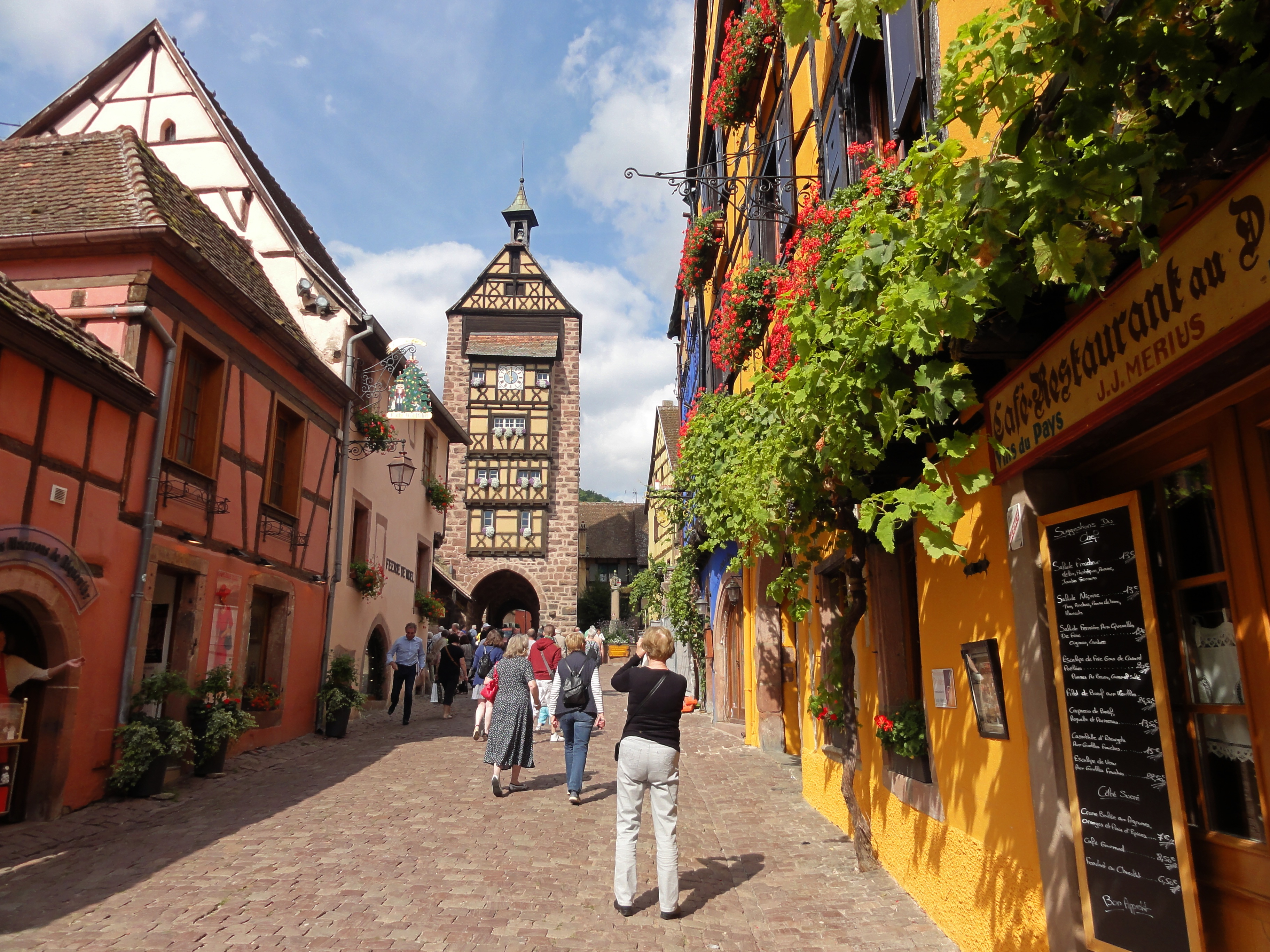 Alsace, Haut-Rhin, Riquewihr, Porte haute de l'enceinte de fortification médiévale dite "Dolder" (XVIe). It is indexed in the Base Mérimée, a database of architectural heritage maintained by the French Ministry of Culture, under the references PA00085603 and IA68000787.